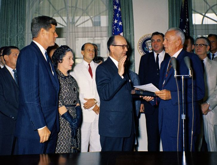 Swearing-in ceremonies for deLesseps S. Morrison as United States Ambassador to the Organization of American States (OAS) and Robert F. Woodward as Assistant Secretary of State for Inter-American Affairs. (L – R): President John F. Kennedy; Virginia Woodward; Robert Woodward (taking oath); Frank K. Sanderson, White House Administrative Officer. deLesseps Morrison (wearing white suit and red tie); Florida Senator George Smathers (back right, behind two men wearing glasses); others unidentified. Cabinet Room, White House, Washington, D.C.